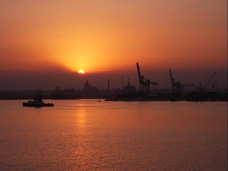 port de tarragona